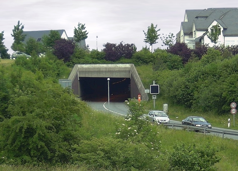 Tunnel/B 236 in Schmallenberg, Germany.